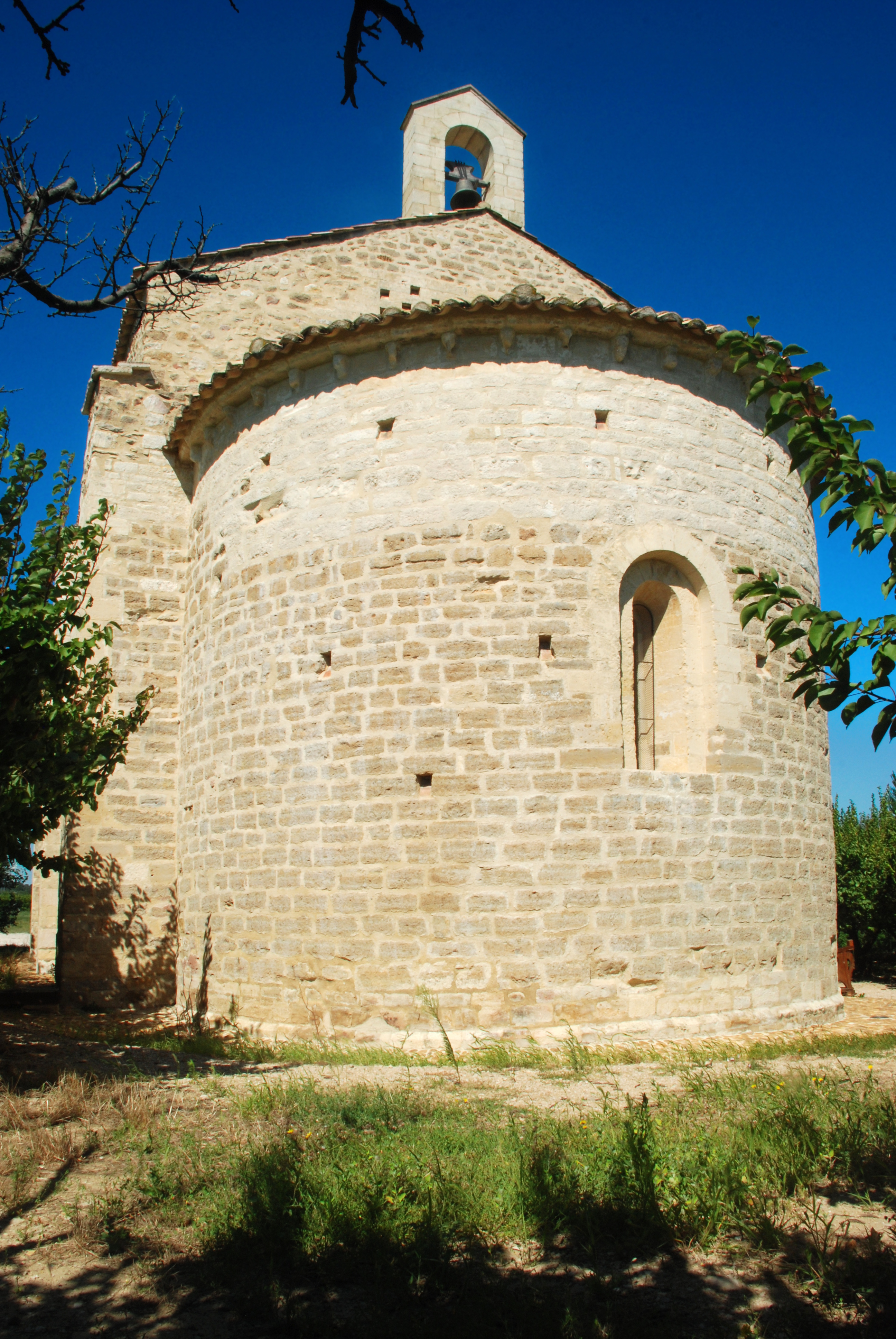 France - Gard - Saint-Paul-les-Fonts - Chapelle Saint-André de Sévanes